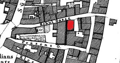 Part of an old city map of Heilbronn showing the Präsenzgasse and Schulgasse